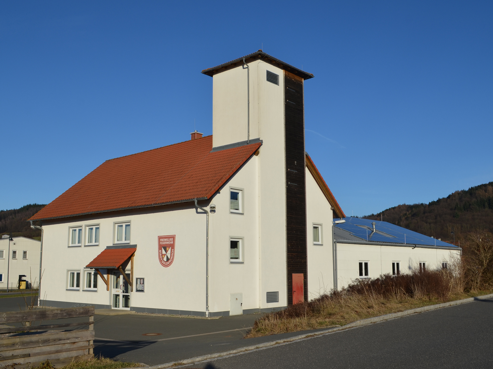 Feuerwehrhaus der Freiwilligen Feuerwehr Goldkronach, Am Altenbaum 8